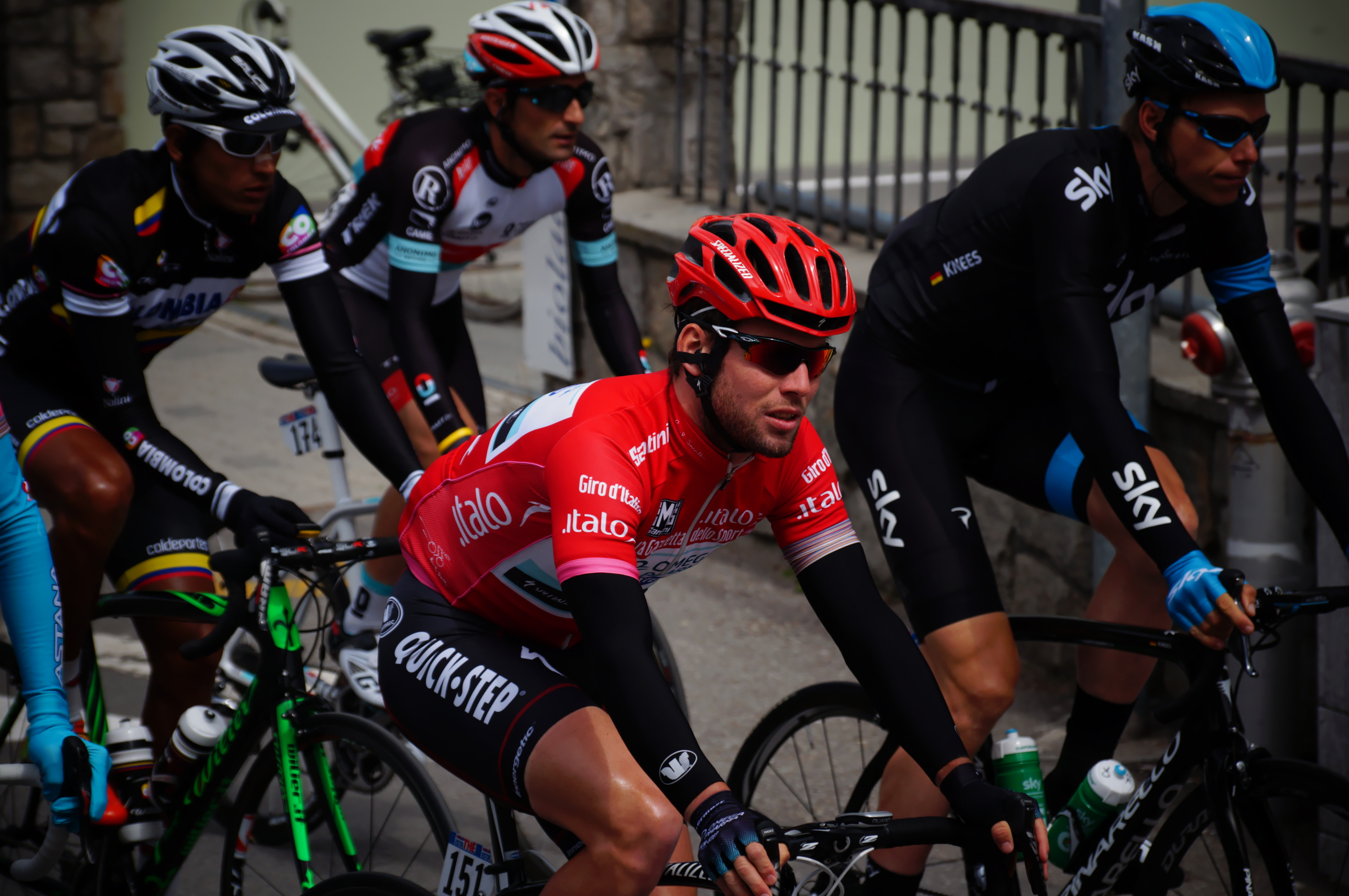 DSC04524_DxO